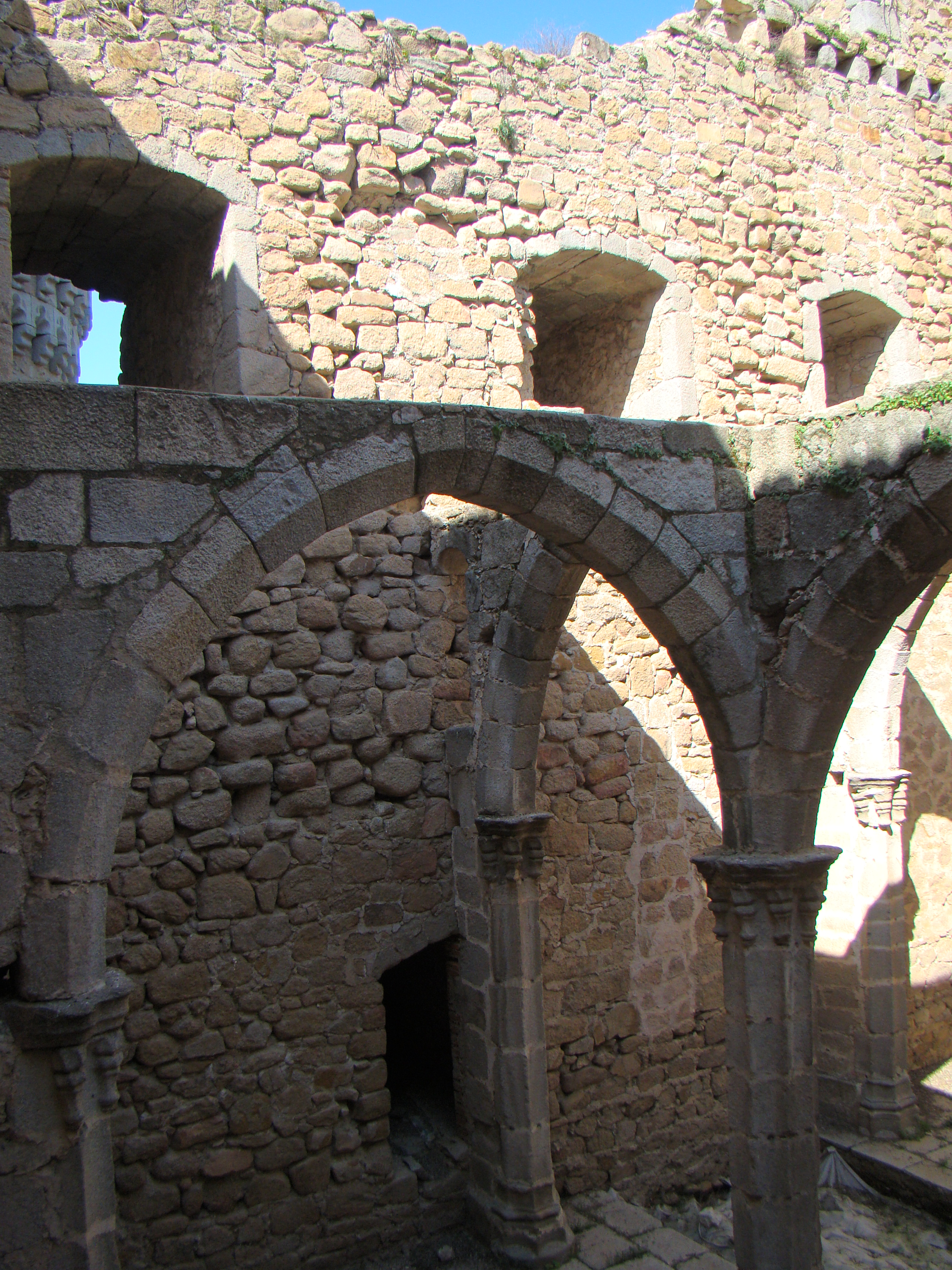 Ruinas de la capilla